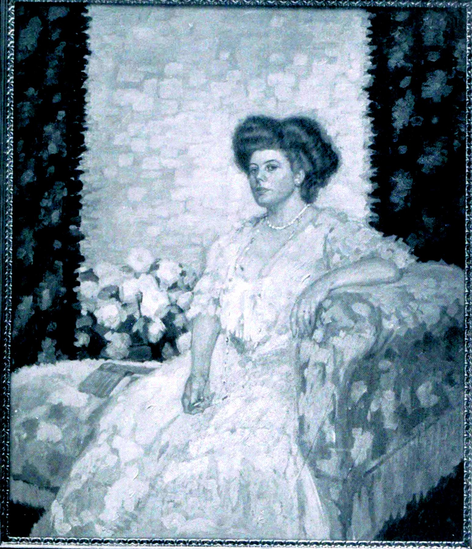 Bildnis Frau Rudolf Chillingworth im Haus Chillingworth, Liebigstraße 3, Nürnberg-Wöhrd